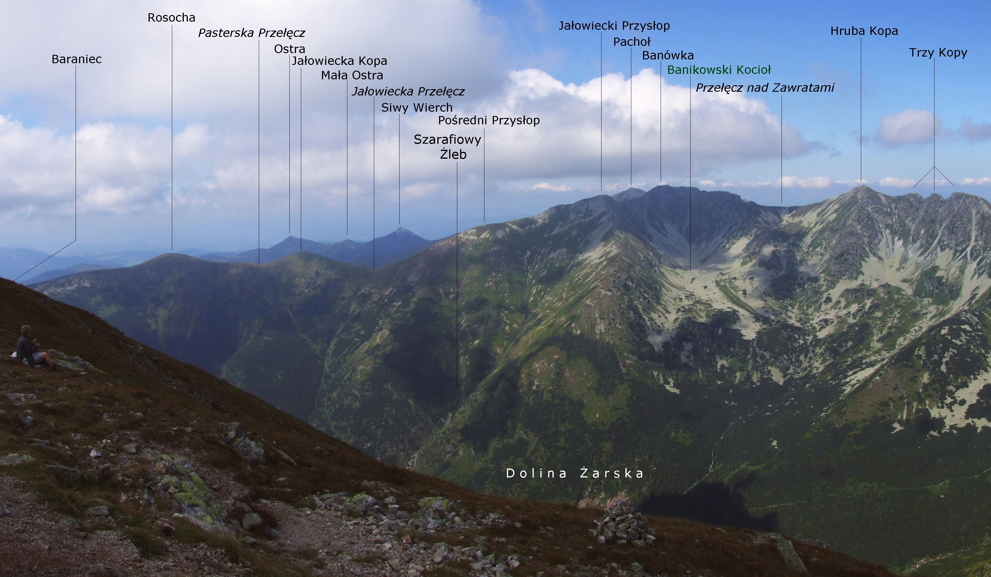 Widok z Barańca (Tatry Zachodnie)